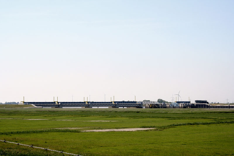 Das Emssperrwerk von Nendorp aus gesehen